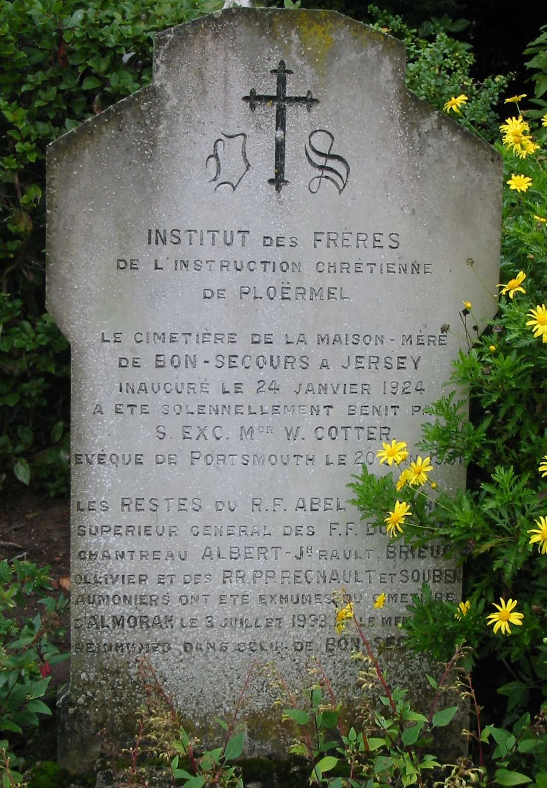 L'ancien institut des Frères de l'instruction chrétienne de Ploërmel à Saint-Sauveur, Jersey Nrf: Dêpartément pouor l'Êducâtion, l'Sport et la Tchultuthe, Jèrri